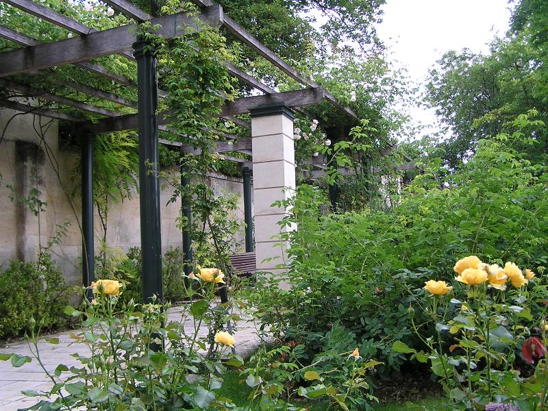 jardin public de Cognac.